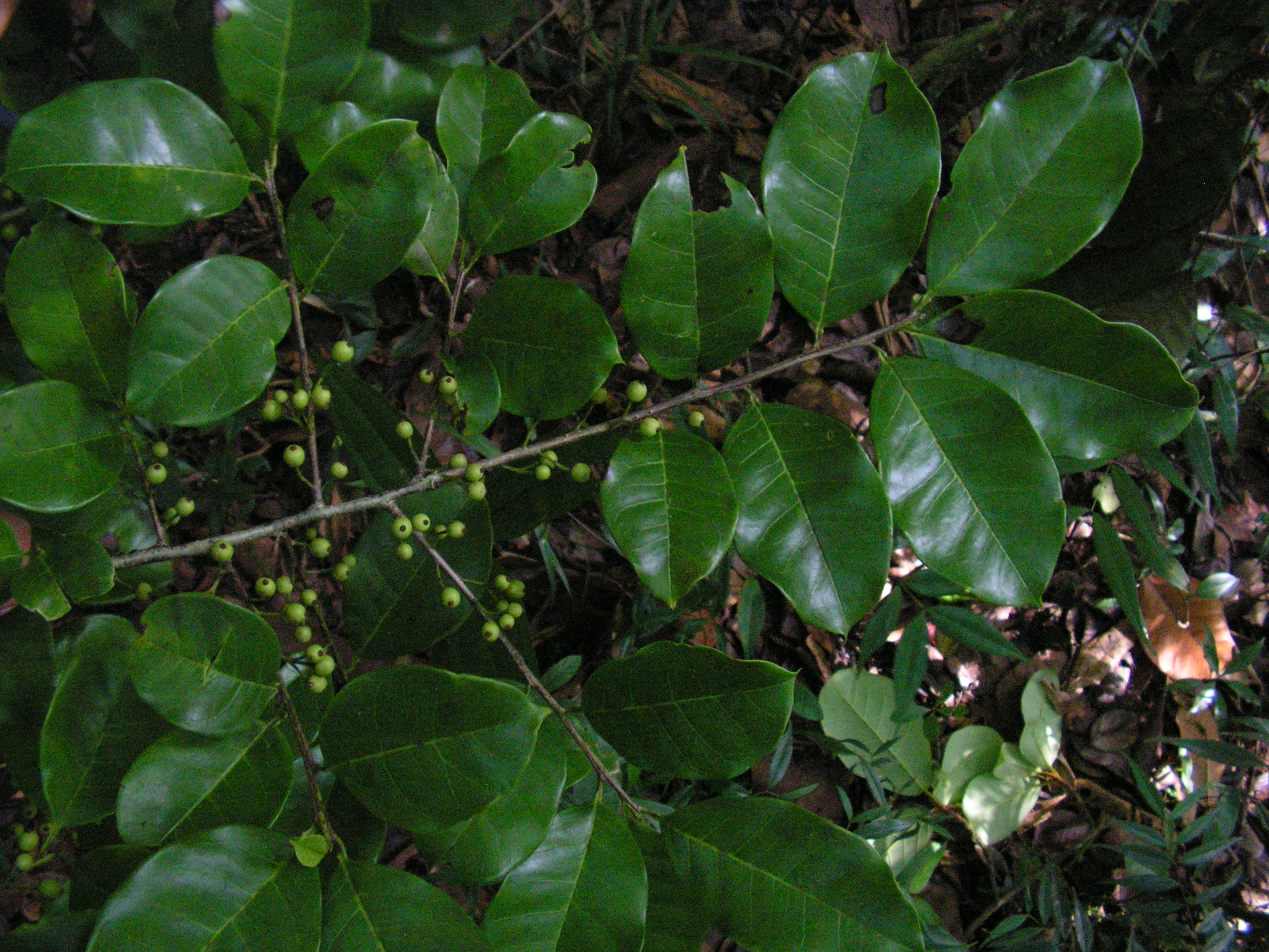 Aquifoliaceae – Ilex sapotifolia Reissek – mané-gonçalves – árvore – RPPN Pedra D’anta – Lagoa dos Gatos – Pernambuco – Brasil